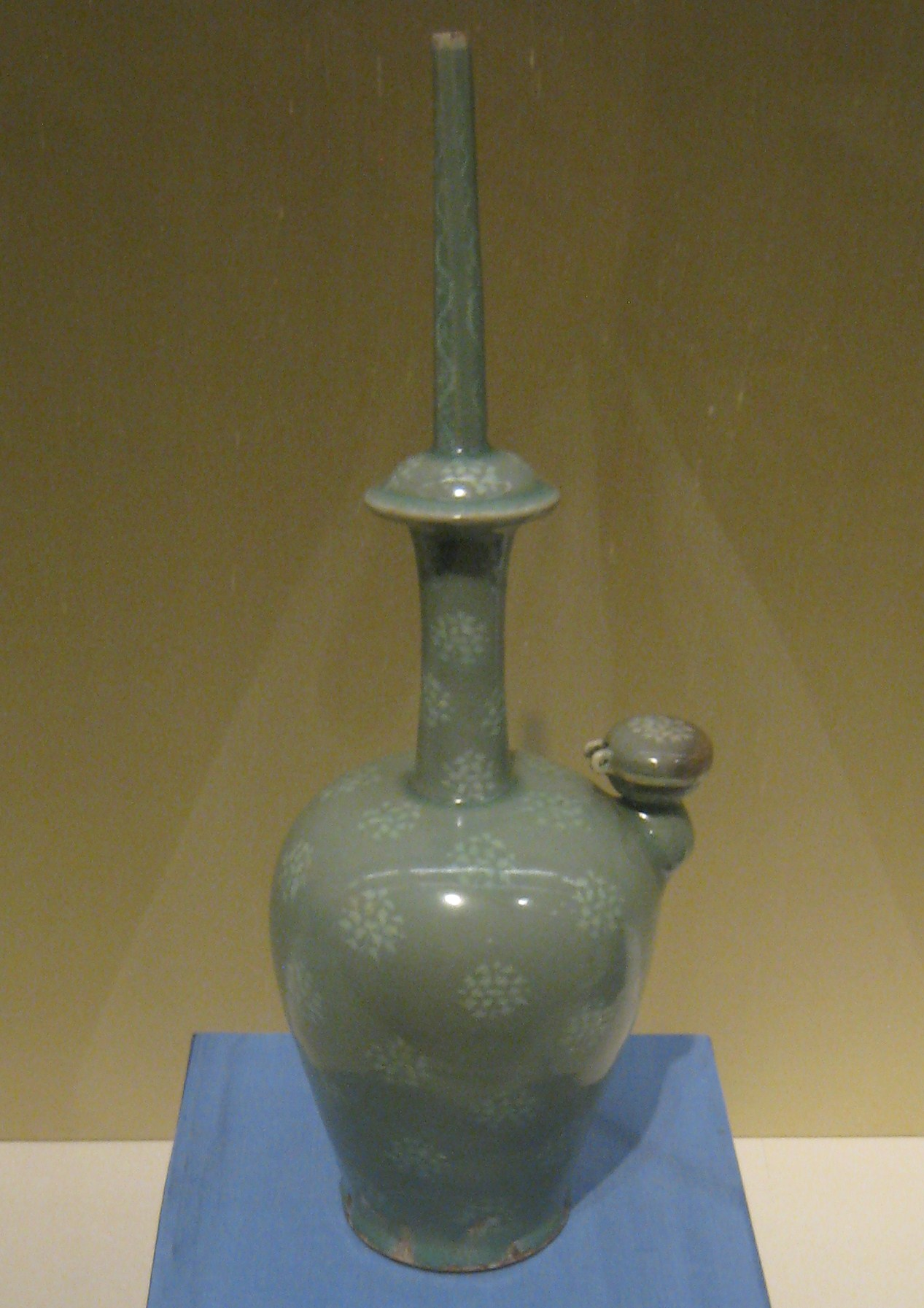 Kundika (vase rituel bouddhiste) en céladon de la période Koryŏ (Corée). Photographie prise au British Museum.